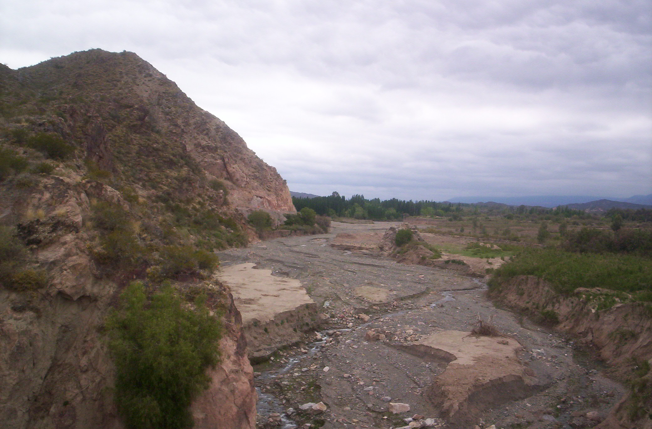 Vista al Río del Agua, en la localidad de Pedernal, departamento Sarmiento, provincia de San Juan, Argentina